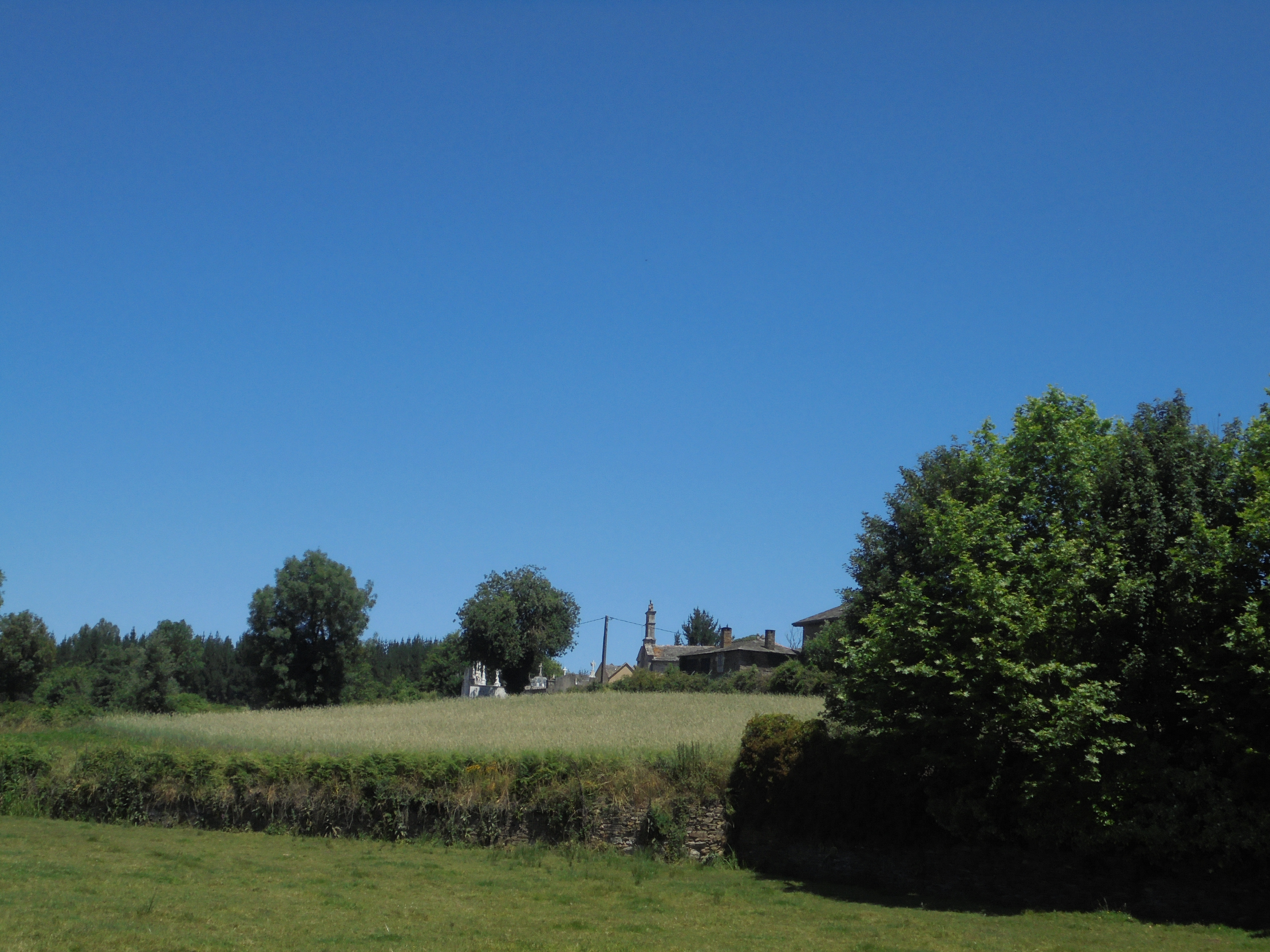 Vista de Anseán ( O Corgo)